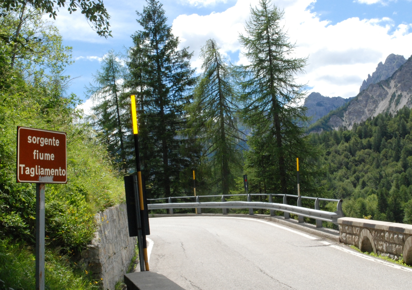 Sorgente del Tagliamento al Passo della Mauria - Comune di Lorenzago di Cadore